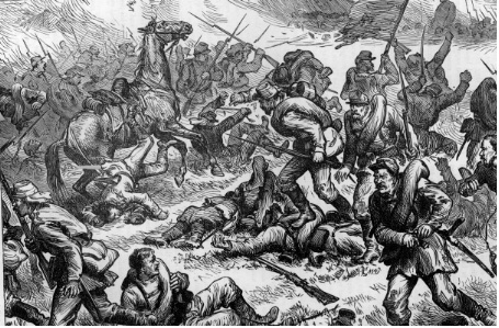 Pleven battle